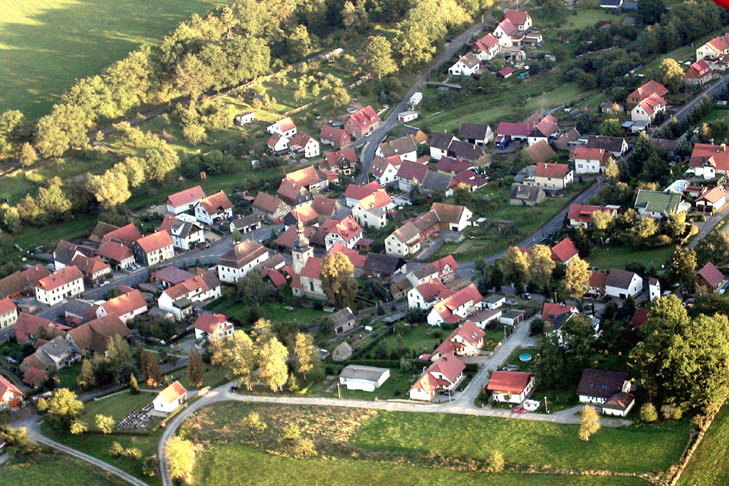 Wölfershausen - Luftbild